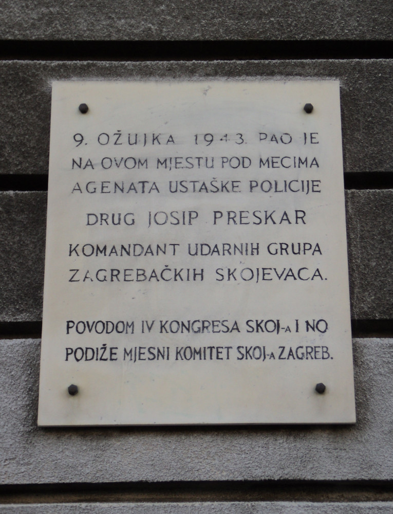 Spomen ploča u Vlaškoj ulici, Zagreb, na mestu gde je u okršaju s ustašama pao narodni heroj Josip Preskar.